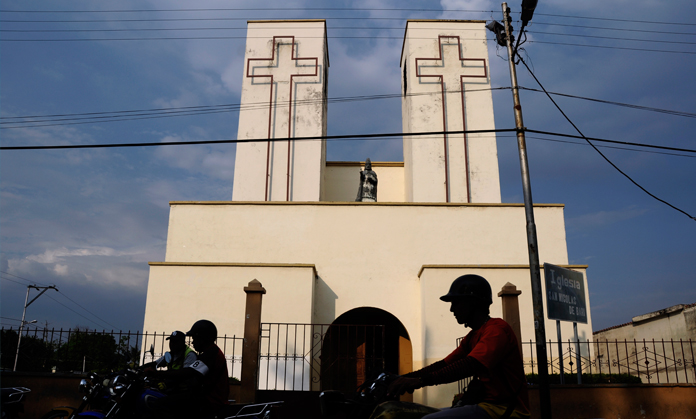 SARARE